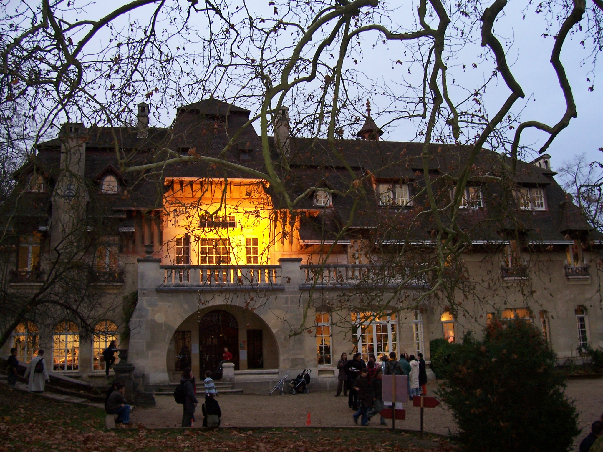 Ecole Steiner-Waldorf Verrieres le Buisson (France)